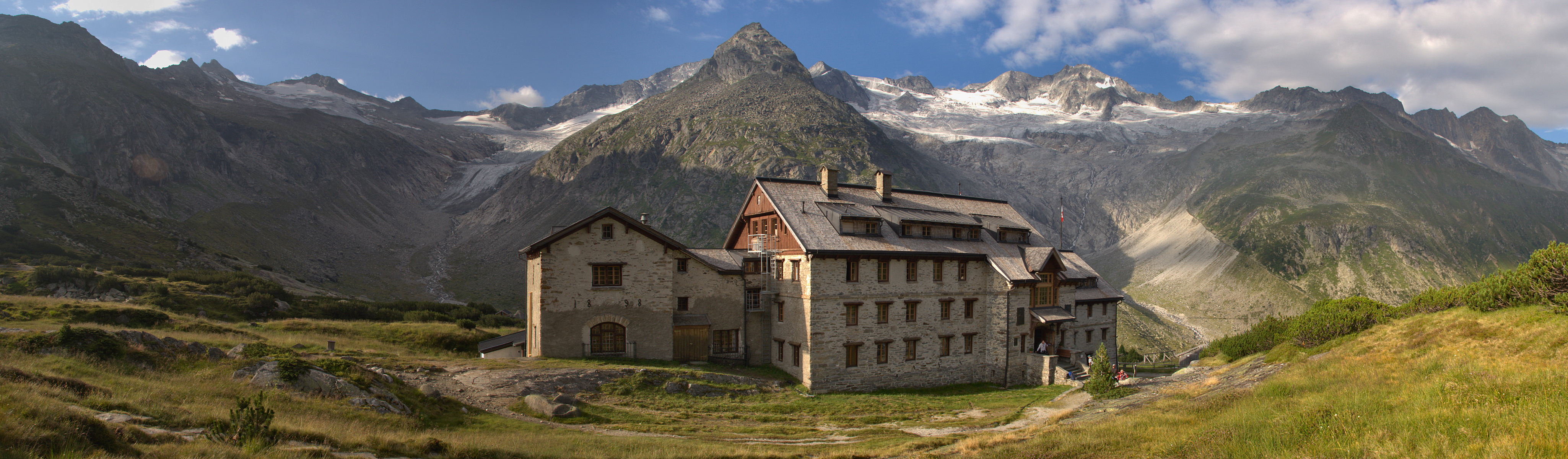 Berliner Hütte im Hintergrund der Hornkees (li.) und Waxeggkees (re.)